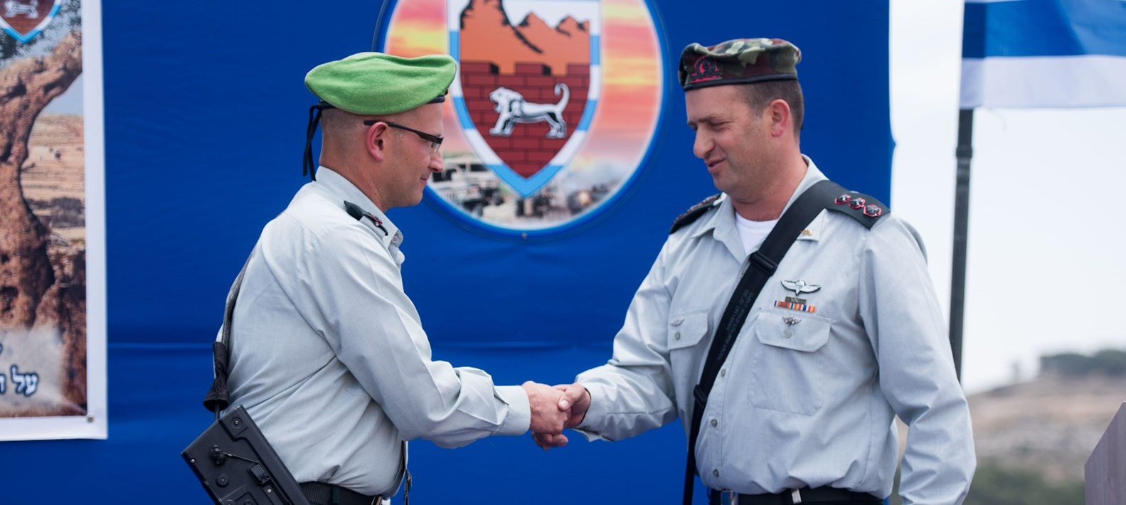 מינוי אל"ם דוד שפירא למפקד חטיבה מרחבית "עציון". אל"ם שפירא, שקיבל בשנת 2008 צל"ש אלוף על אומץ לב בחיסול המחבל בישיבת מרכז הרב, מחליף בתפקידו את אל"ם שרון אסמן, שכיהן בתפקיד במהלך עשרת החודשים האחרונים.